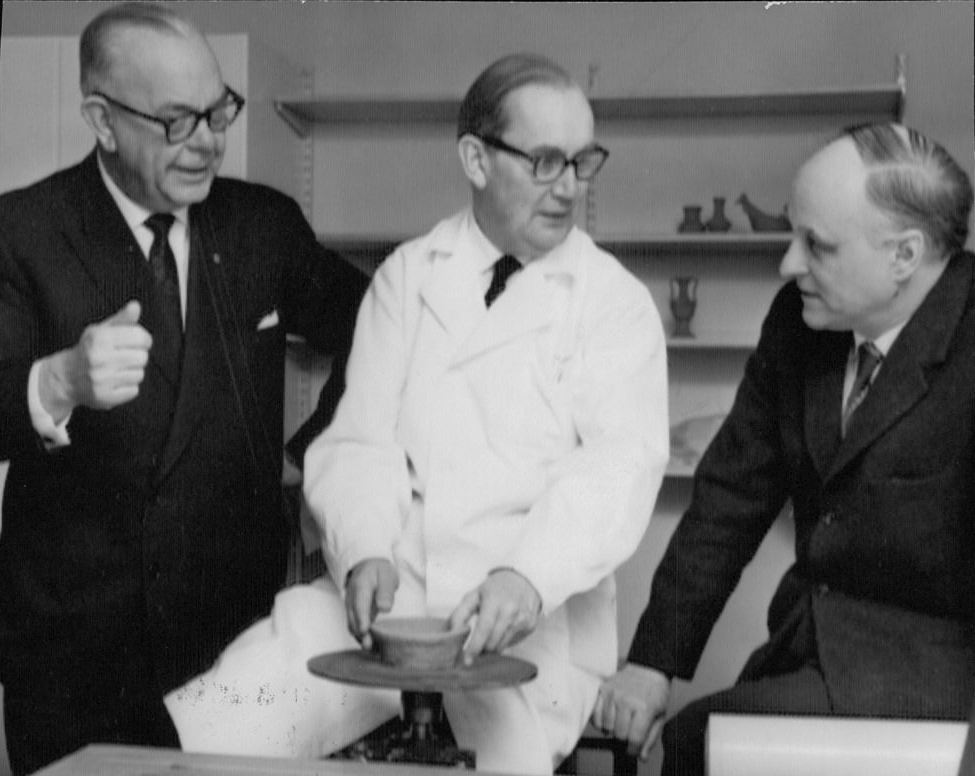 Kommunalråd Harald Lindvall (1897-1984), docent Karl Gustav Dahlgren (1909-1979) och arkitekt Sture Kelfve (1905-1983).